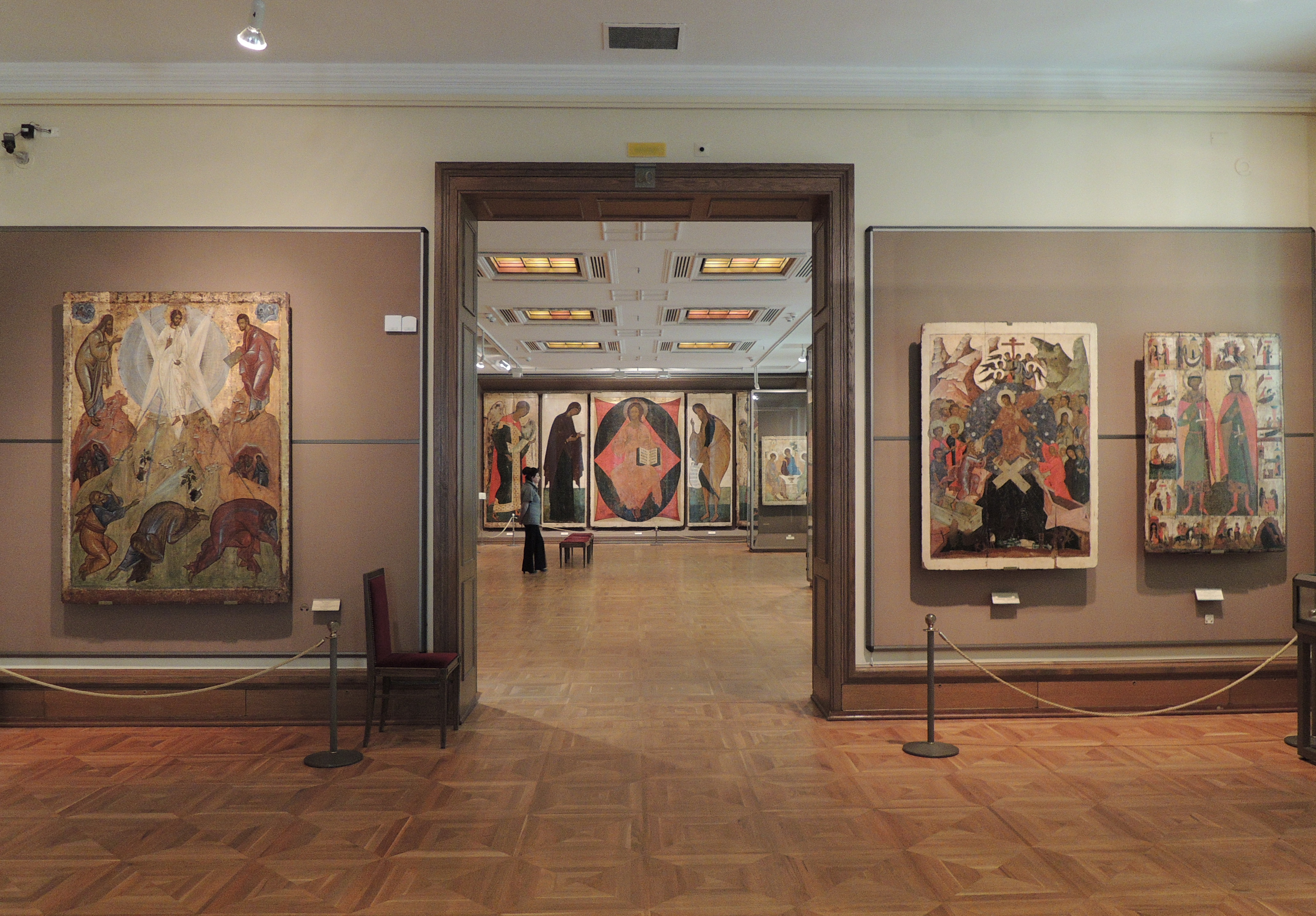 Третьяковская галерея